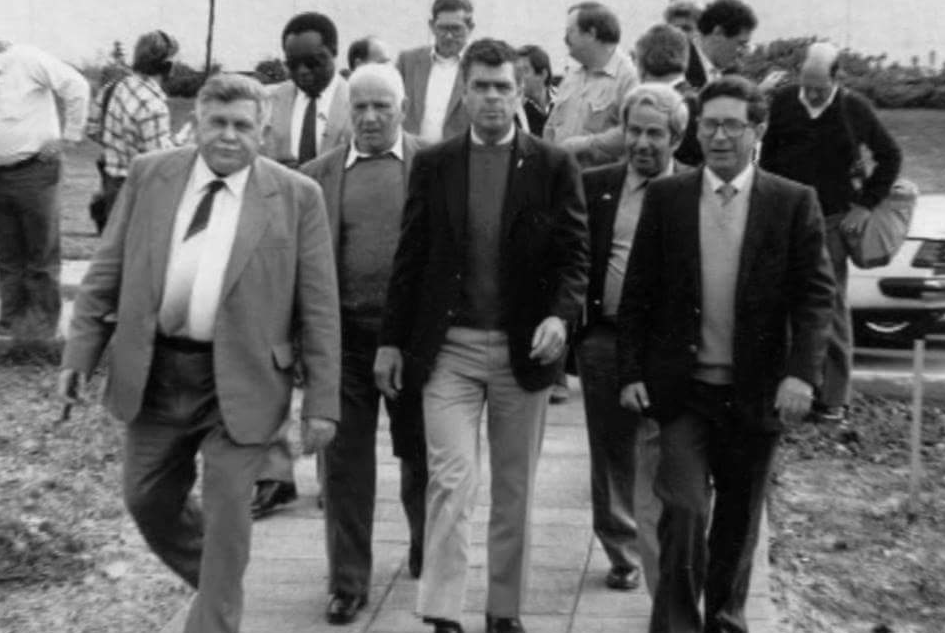 Gad Loebenstein